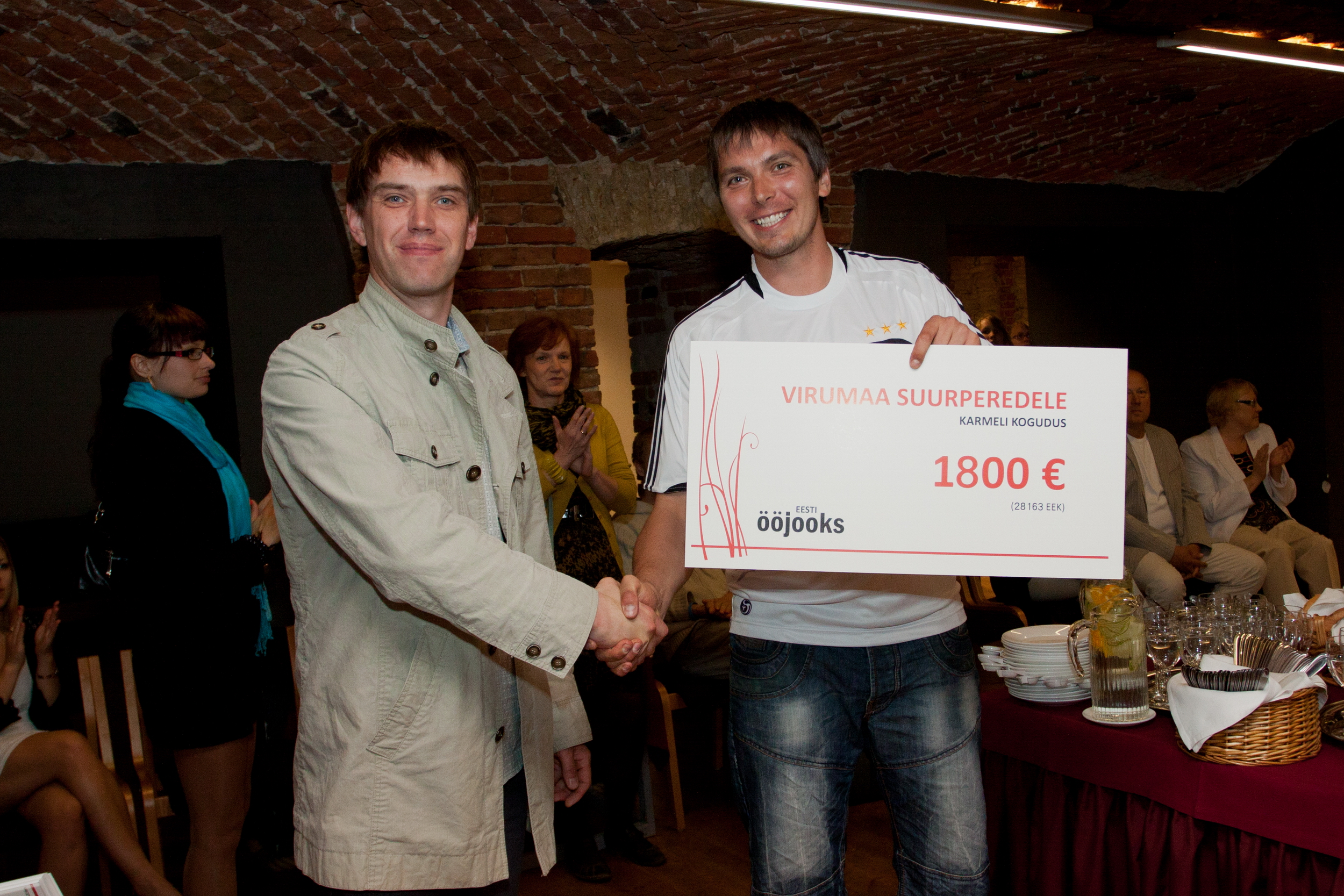 Karmeli kogudusele annetati 1800 eurot